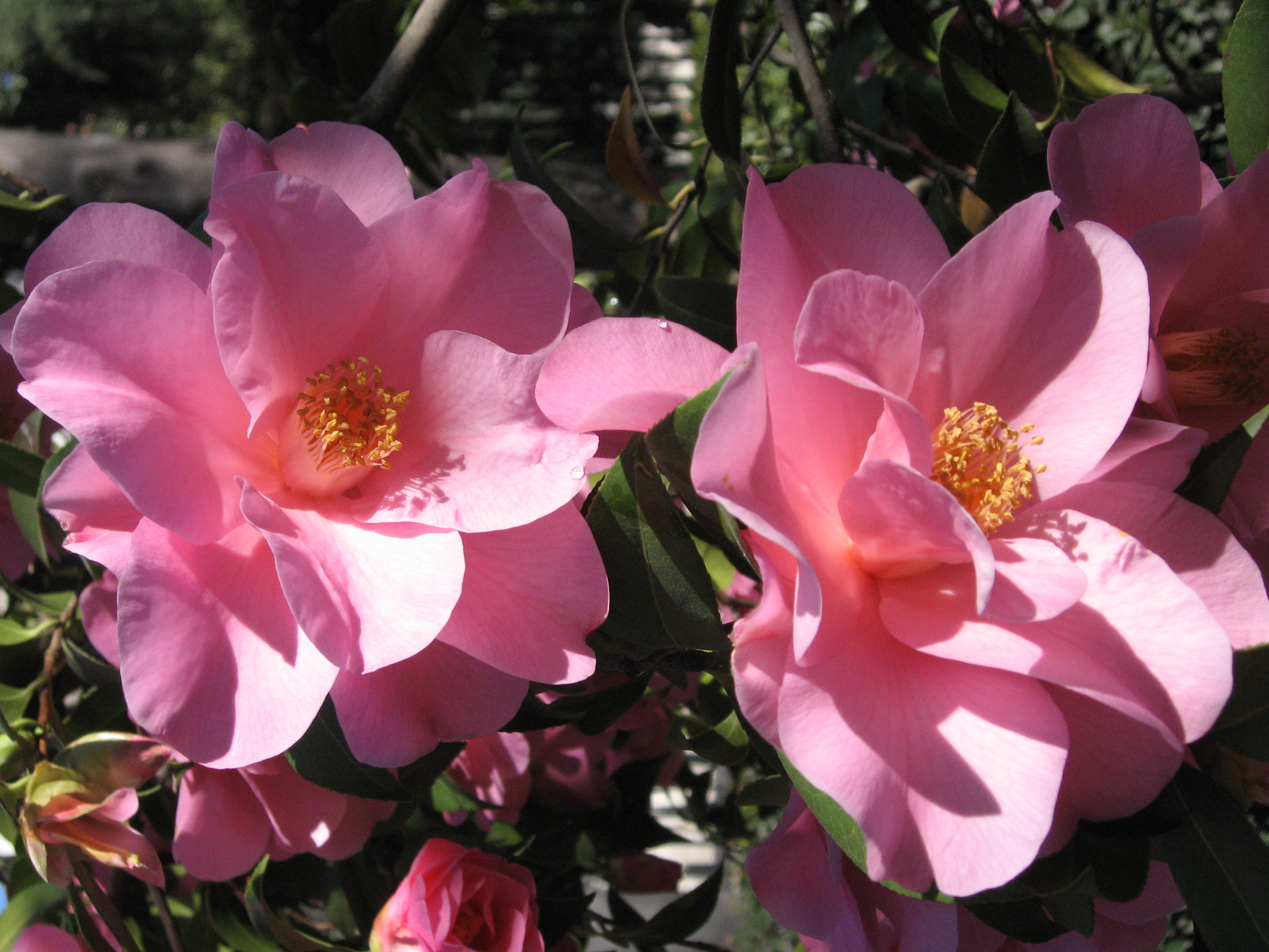 Camellia x williamsii 'Brigadoon'. Real Jardín Botánico, Madrid, España.